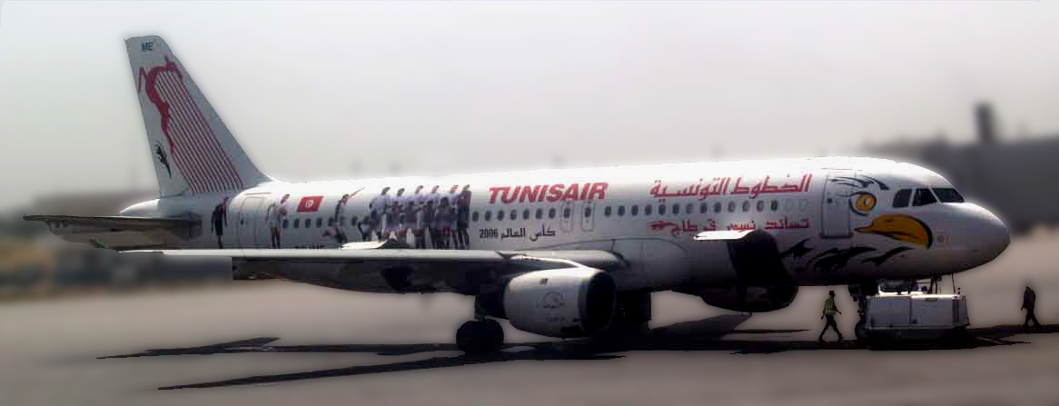 Un A320 de Tunis Air aux couleurs de la coupe du monde 2006 Photo personnelle Bertrand Bouret Retouchée par Karta24